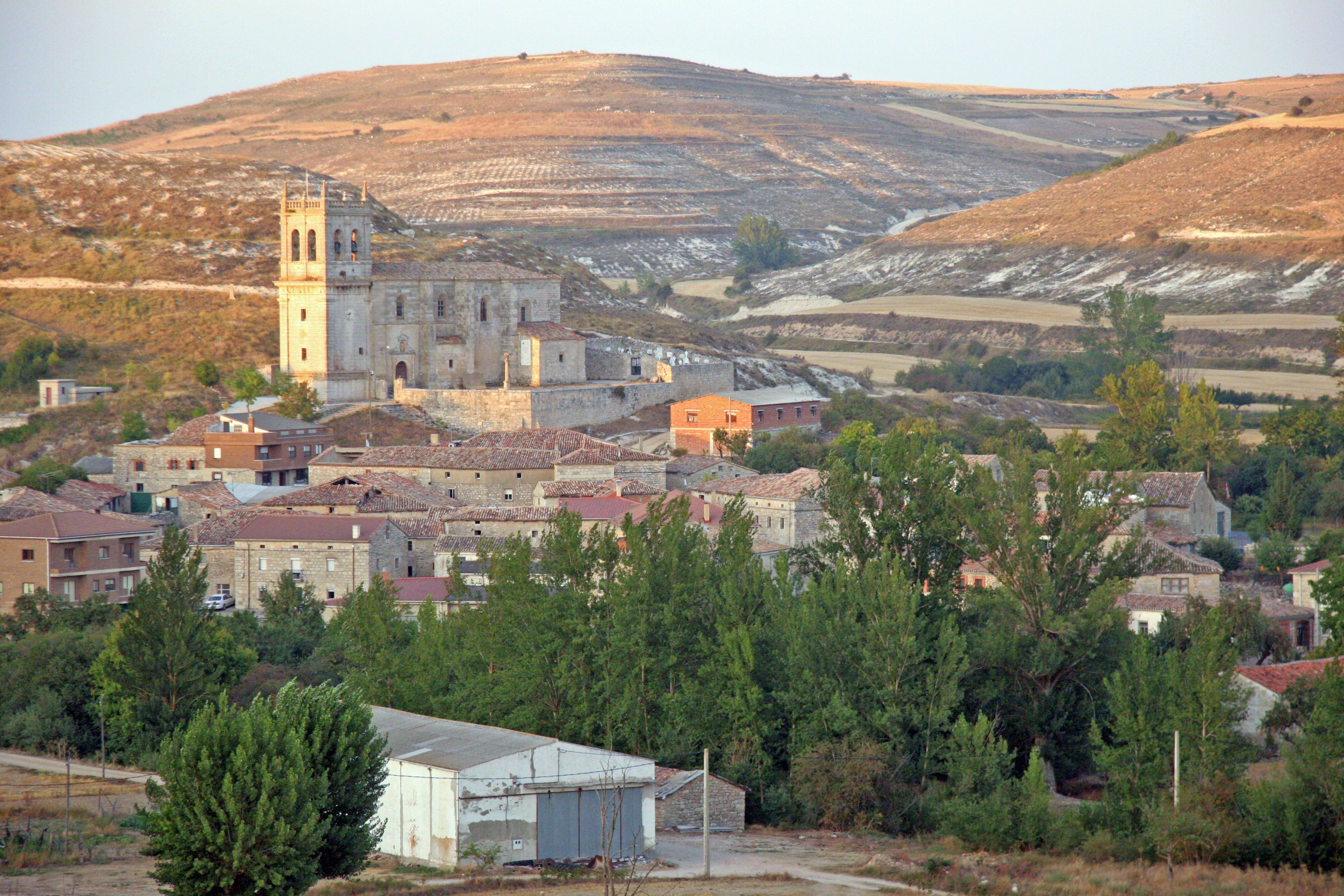 Tobar al atardecer